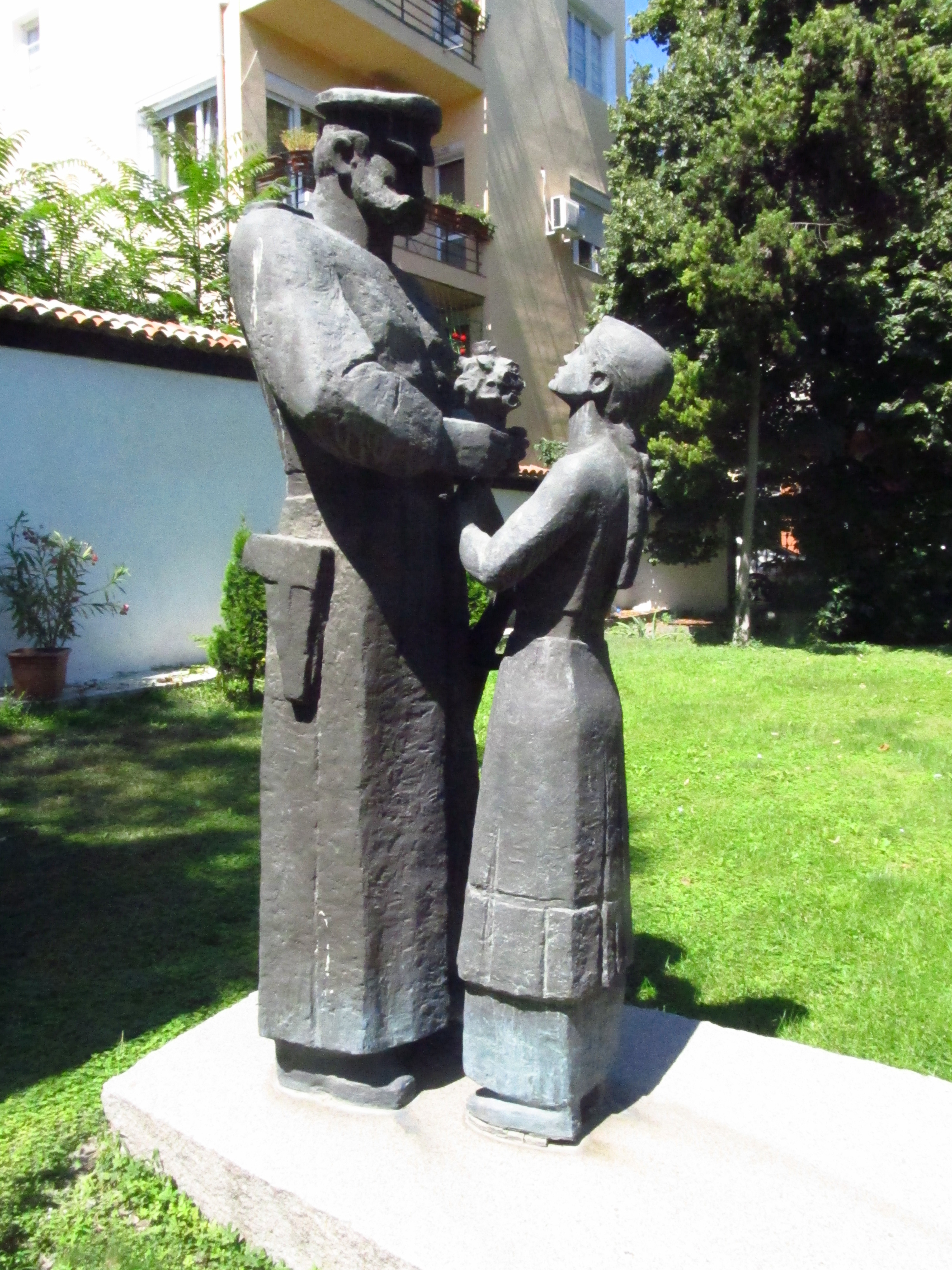 Паметник на руските войски, освободили Варна на 27 юли 1878 г., в двора на църквата «Св. Архангел Михаил»